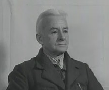 Josef Theodor Vogt, auch Joseph Vogt (* 18. Februar 1884 in Urspringen; † unbekannt), war ein deutscher Beamter und SS-Standartenführer im SS-Wirtschafts- und Verwaltungshauptamt (WVHA). Als Amtschef A IV im WVHA leitete er die Finanz- und Buchprüfung der Waffen-SS. Vogt war Angeklagter im Pohl-Prozess, einem der Nürnberger Nachfolgeprozesse, und wurde 1947 freigesprochen.